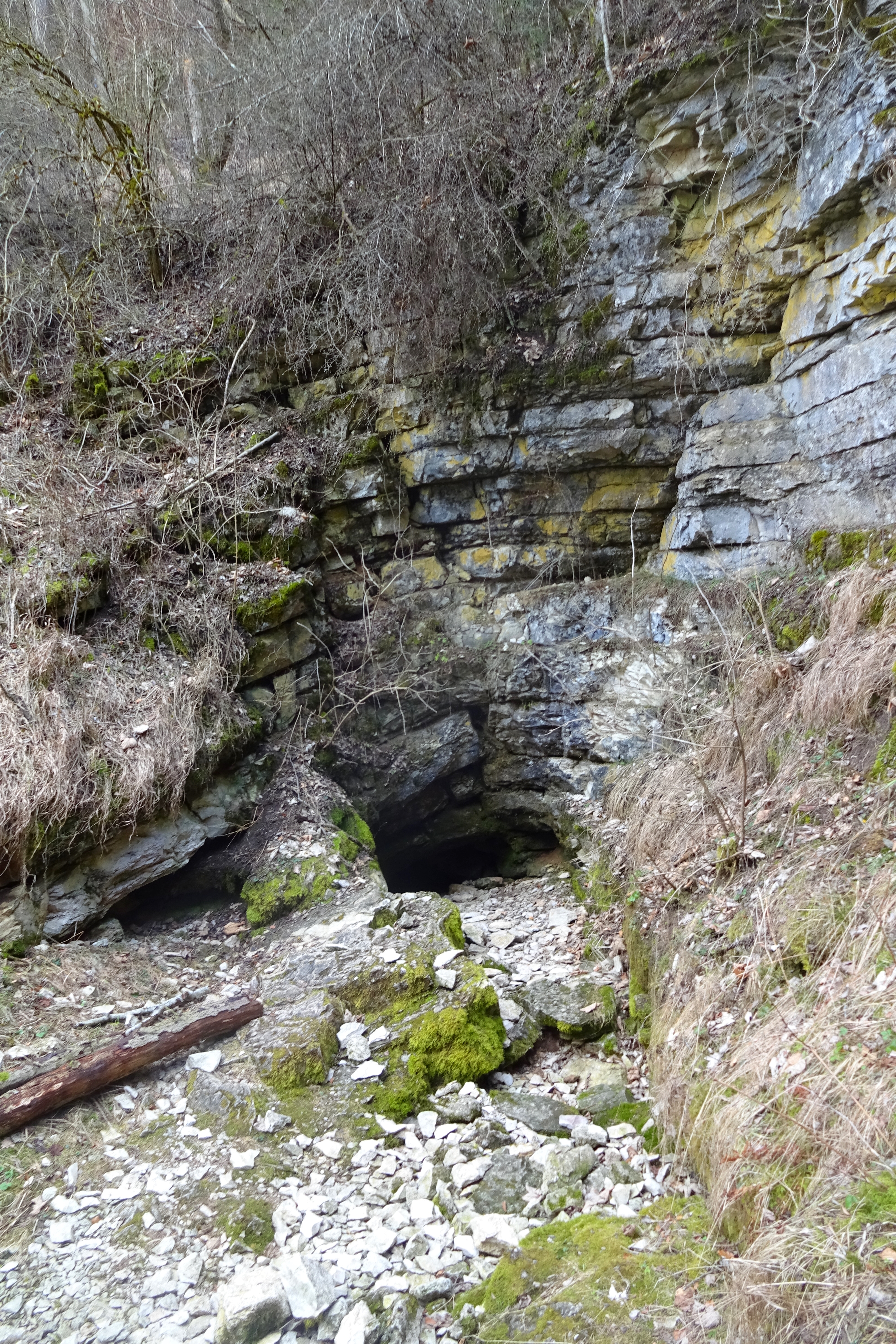 Tummler im Leinleitertal in der Fränkischen Schweiz zwischen Laibarös und der Heroldsmühle